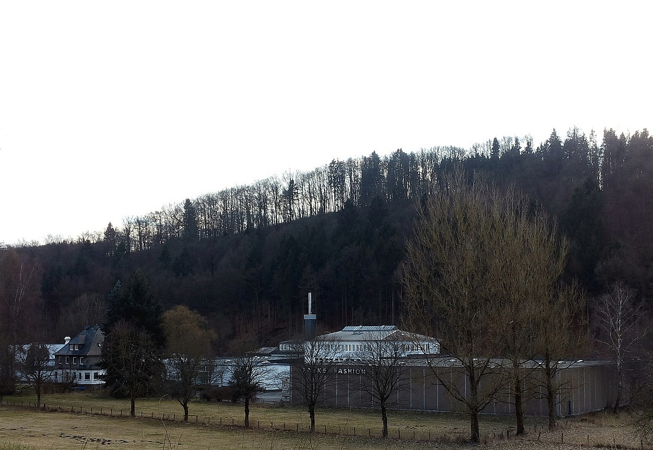 Falke Fashion, Schmallenberg, Ohlgasse (Germany)